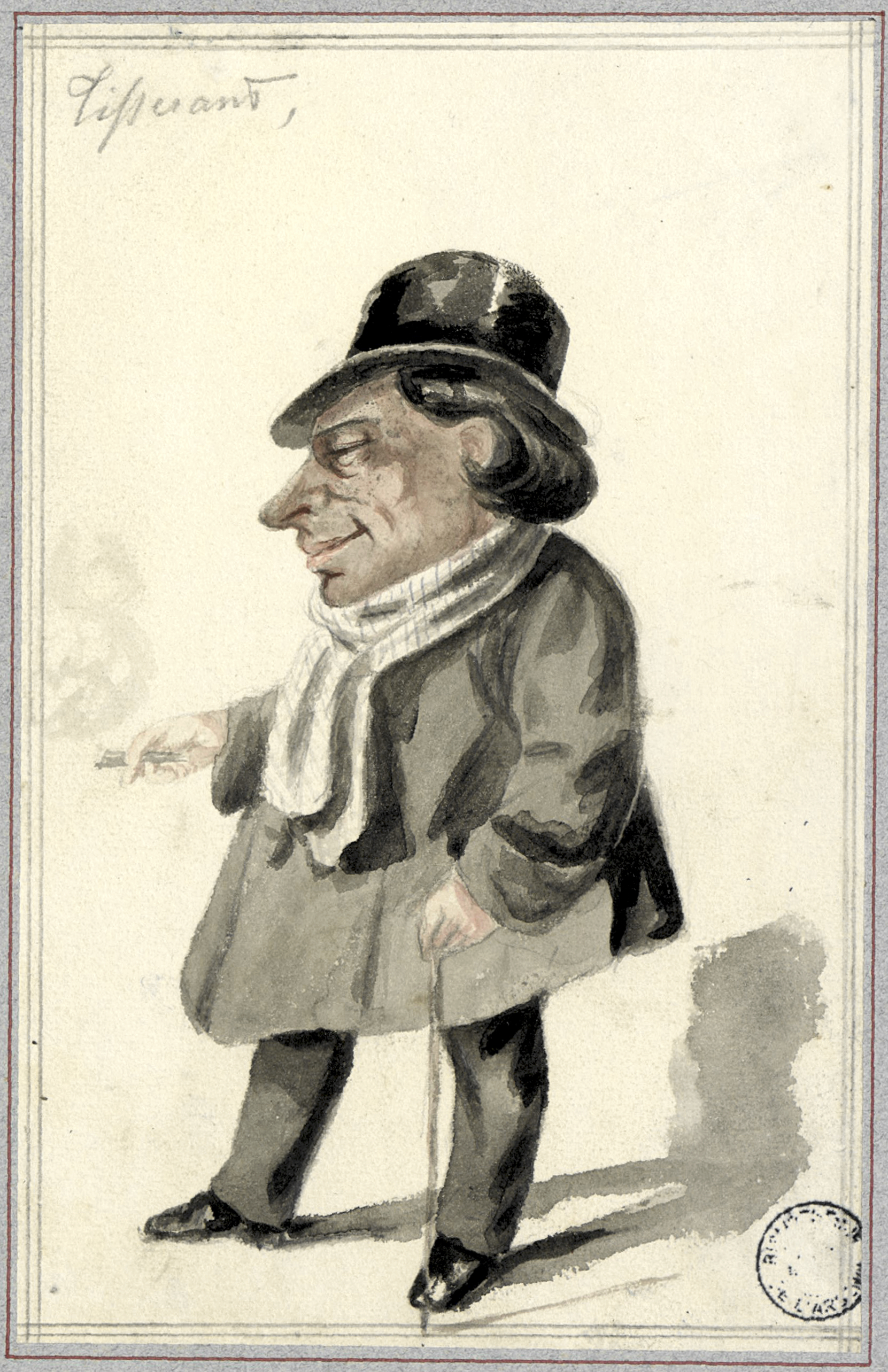 Caricature of Hippolyte Tisserant (1809–1877), French actor.